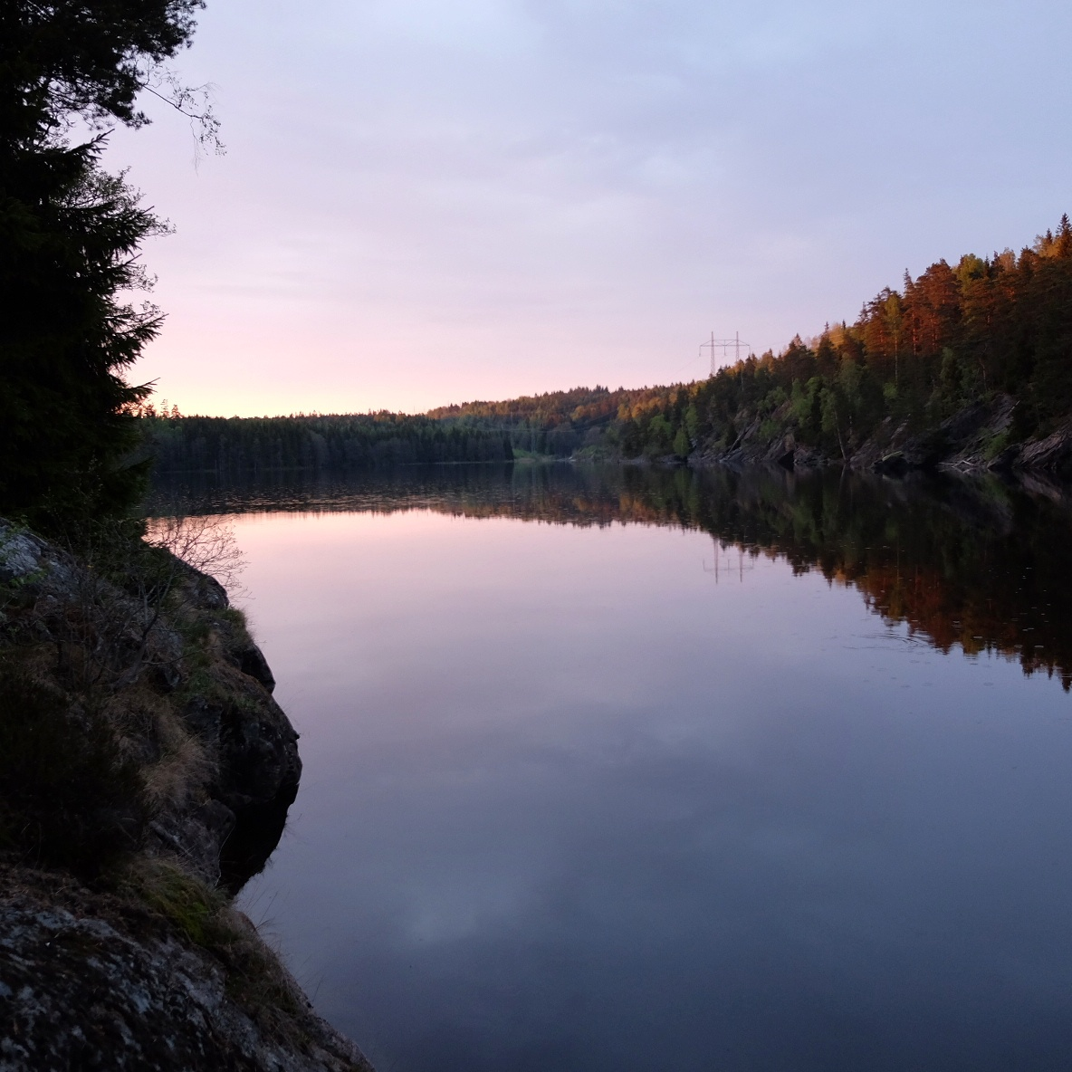 Skiffertjärn (Långetjärn) utanför Dals Rostock.